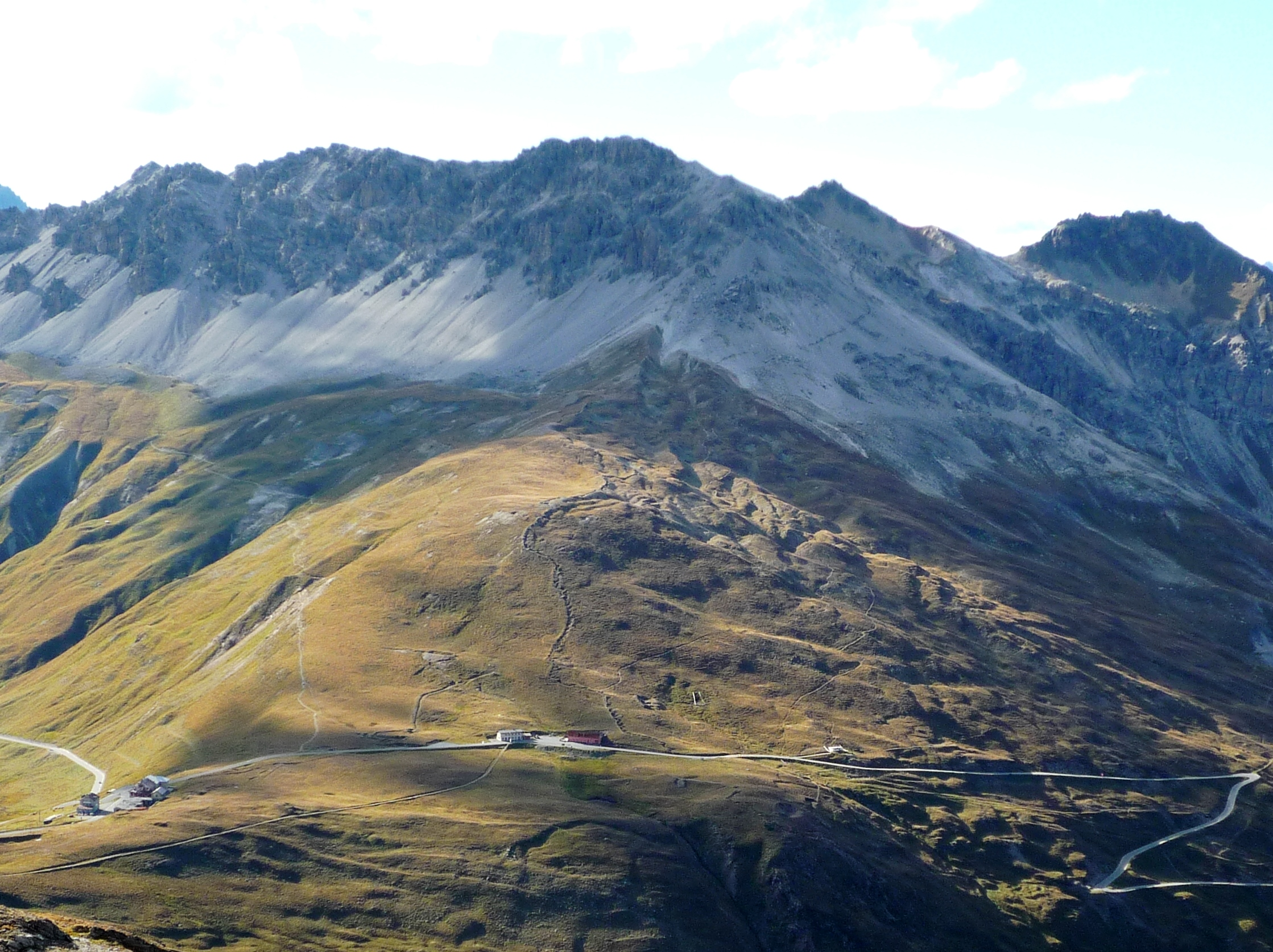 Piz Umbrail mit der Umbrailpasshöhe im Vordergrund; Wanderwege zum Gipfel sind erkennbar; aufgenommen von der Dreisprachenspitze